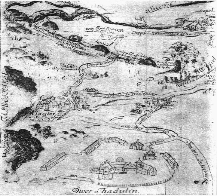 Беларуская (тарашкевіца): Двор Тадулін (Tadulin) князёў Агінскіх (Aginski) каля мястэчка Янавічаў (Janavičy)